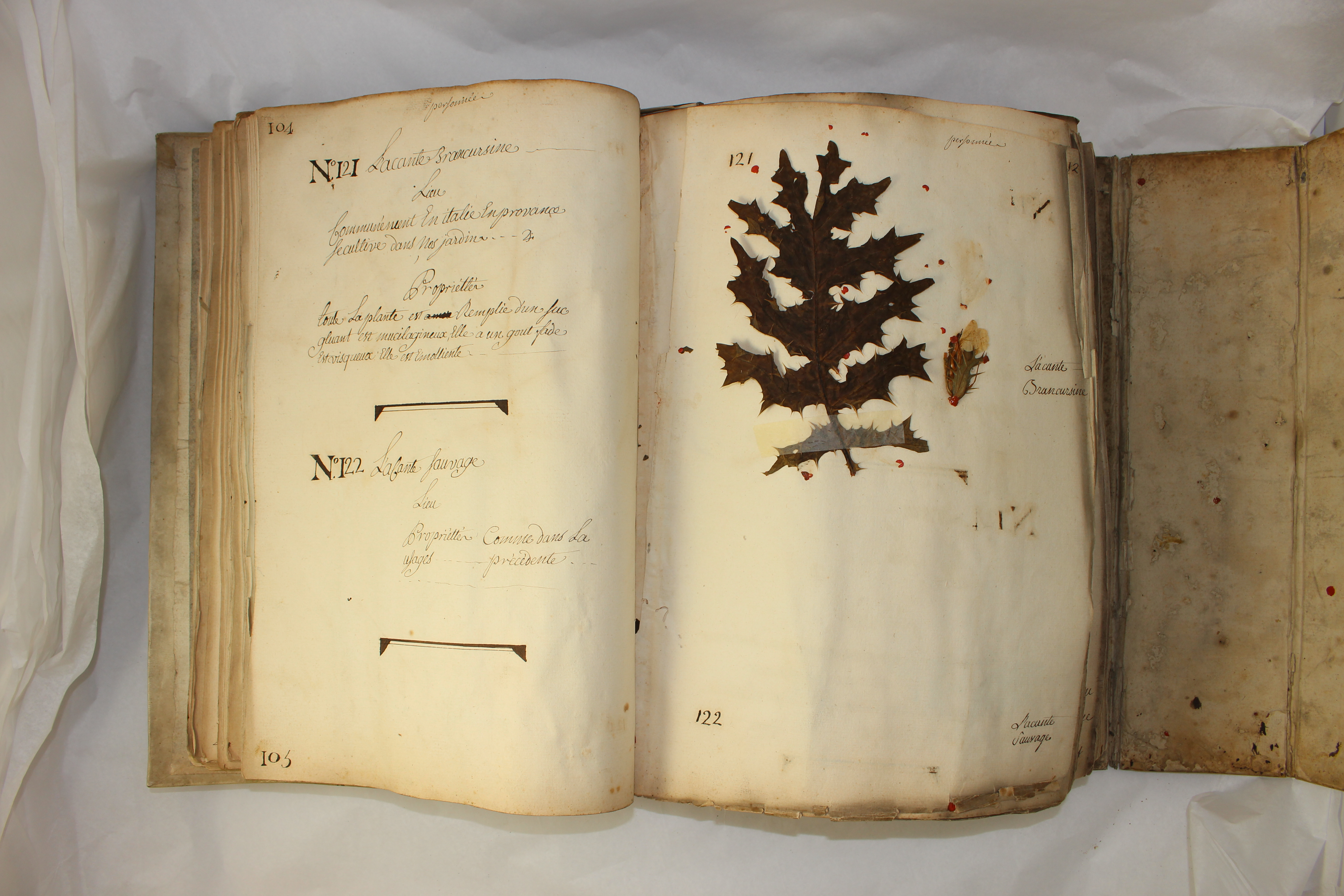 2007.0.1764.M 490 papier vergé, parchemin, cire, cuir (collage, écriture manuscrite à l’encre) L. 44,7 cm ; H. 17 cm ; l. 31 cm 1768 662 espèces végétales référencées Propriété du Musée des Hospices civils de Lyon - Propriété Musée de France